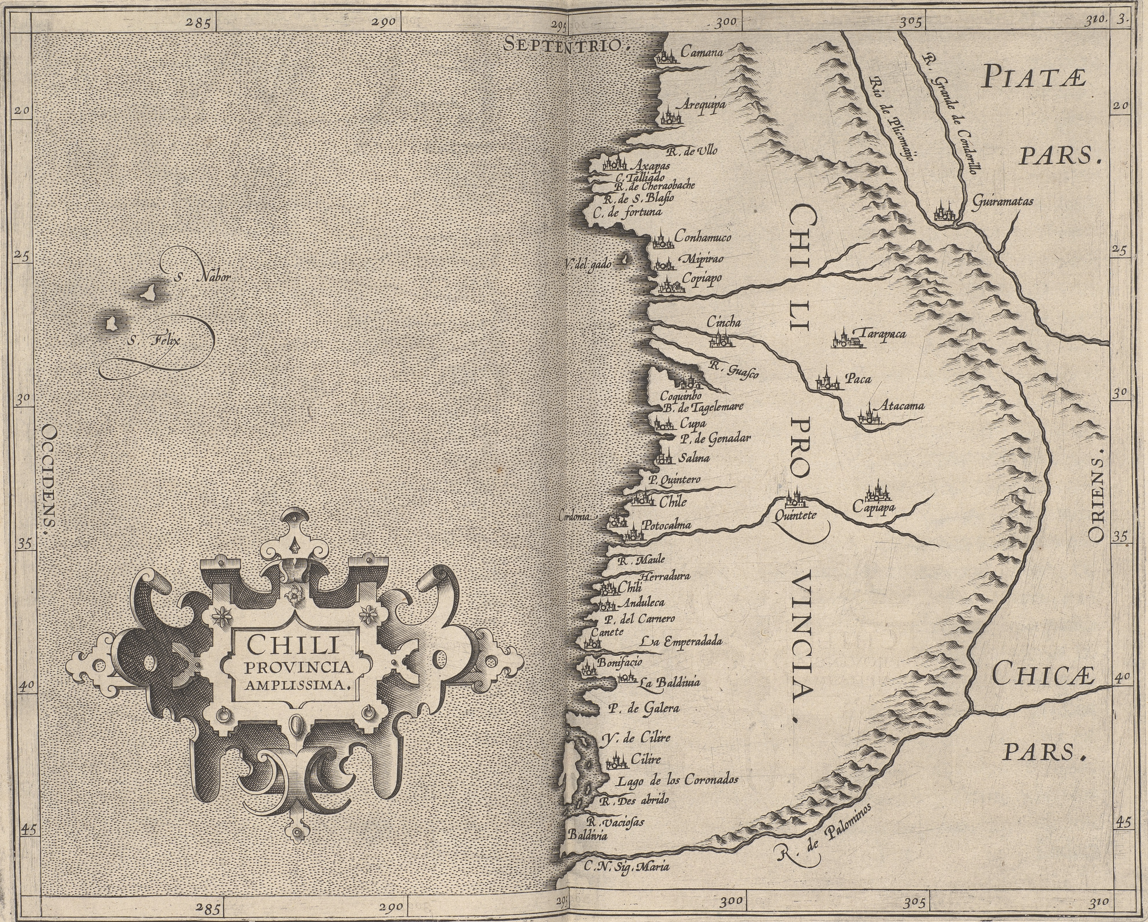 Digitaliserad version av "Descriptionis Ptolemaicæ avgmentvm siue Occidentis notitia breui commentario illustrata."